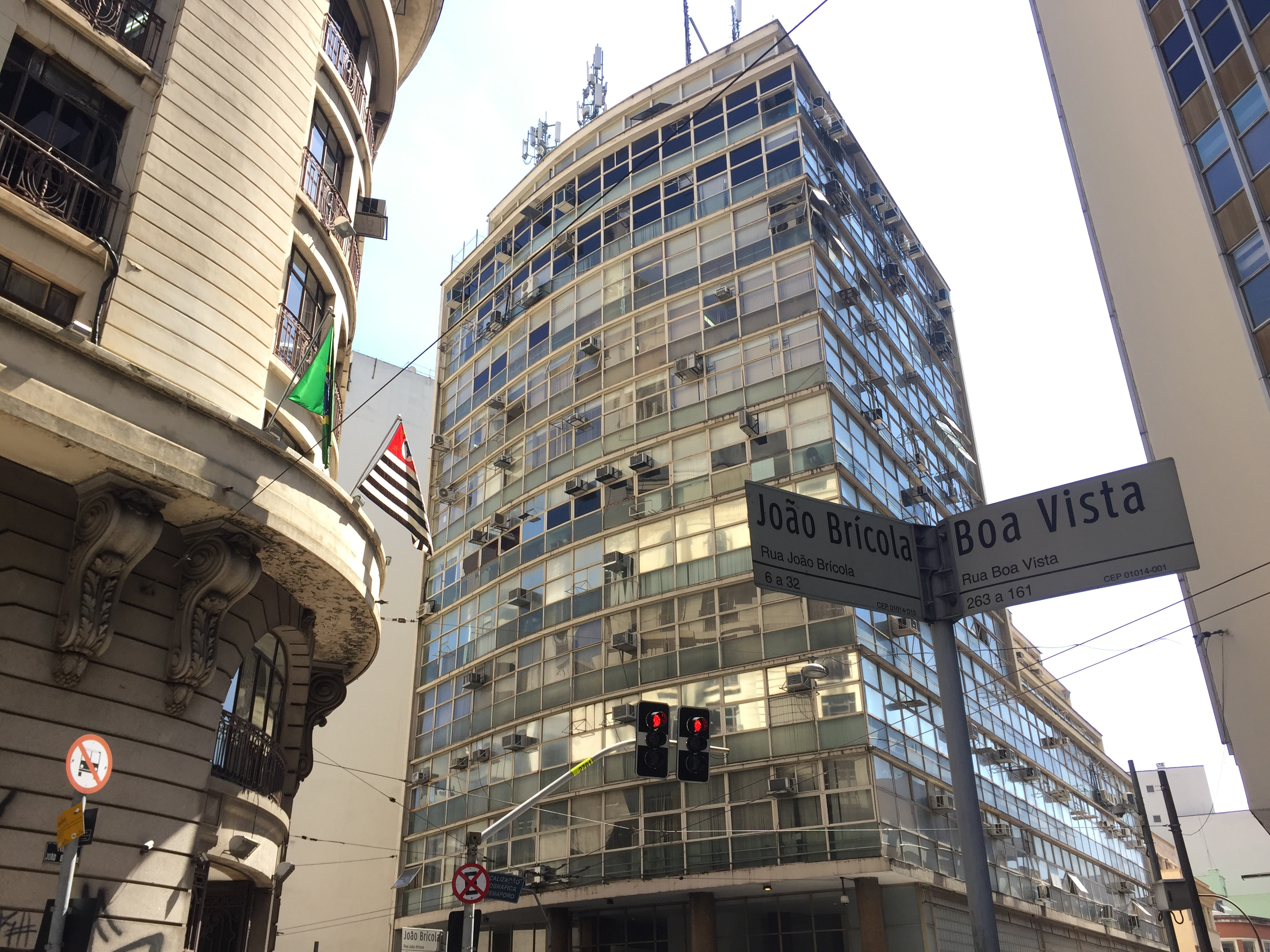 Face do Edifício Banco Paulista do Comércio, em São Paulo (SP), Brasil